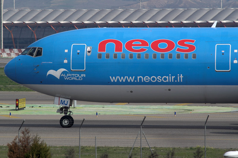 Neos Boeing 737-600 EI-DMJ